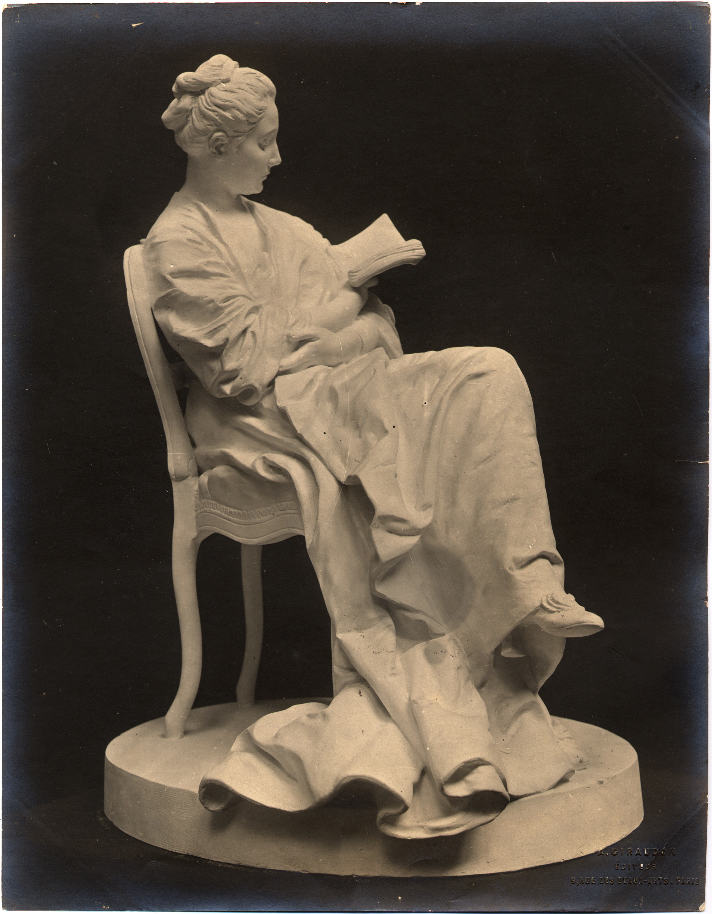 statuette